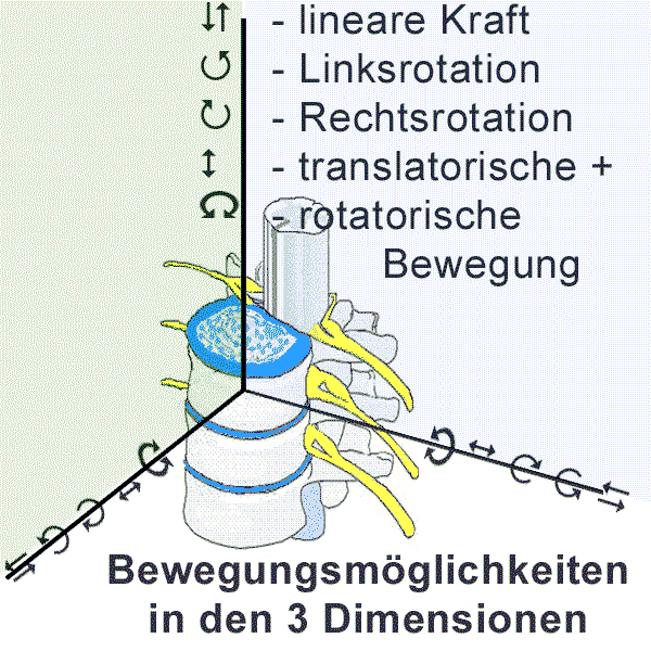 Darstellung der Bewegung in den 3 Dimensionen der WS unter Verwendung von "Bild:Discusprolaps.jpg" von Benutzer Uwe Gille